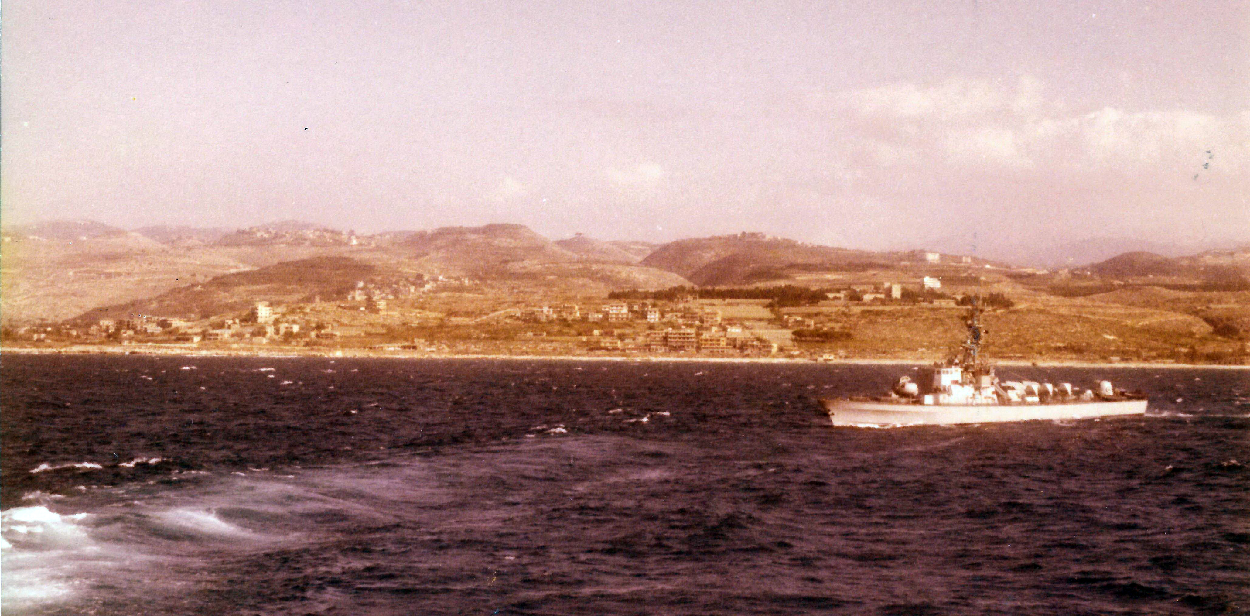 אח"י רומח (סער 4.5) מדגם נושב, בפיקוד רון גינזבורג מתצפתת על חופי דרום לבנון במהלך מלחמת לבנון הראשונה